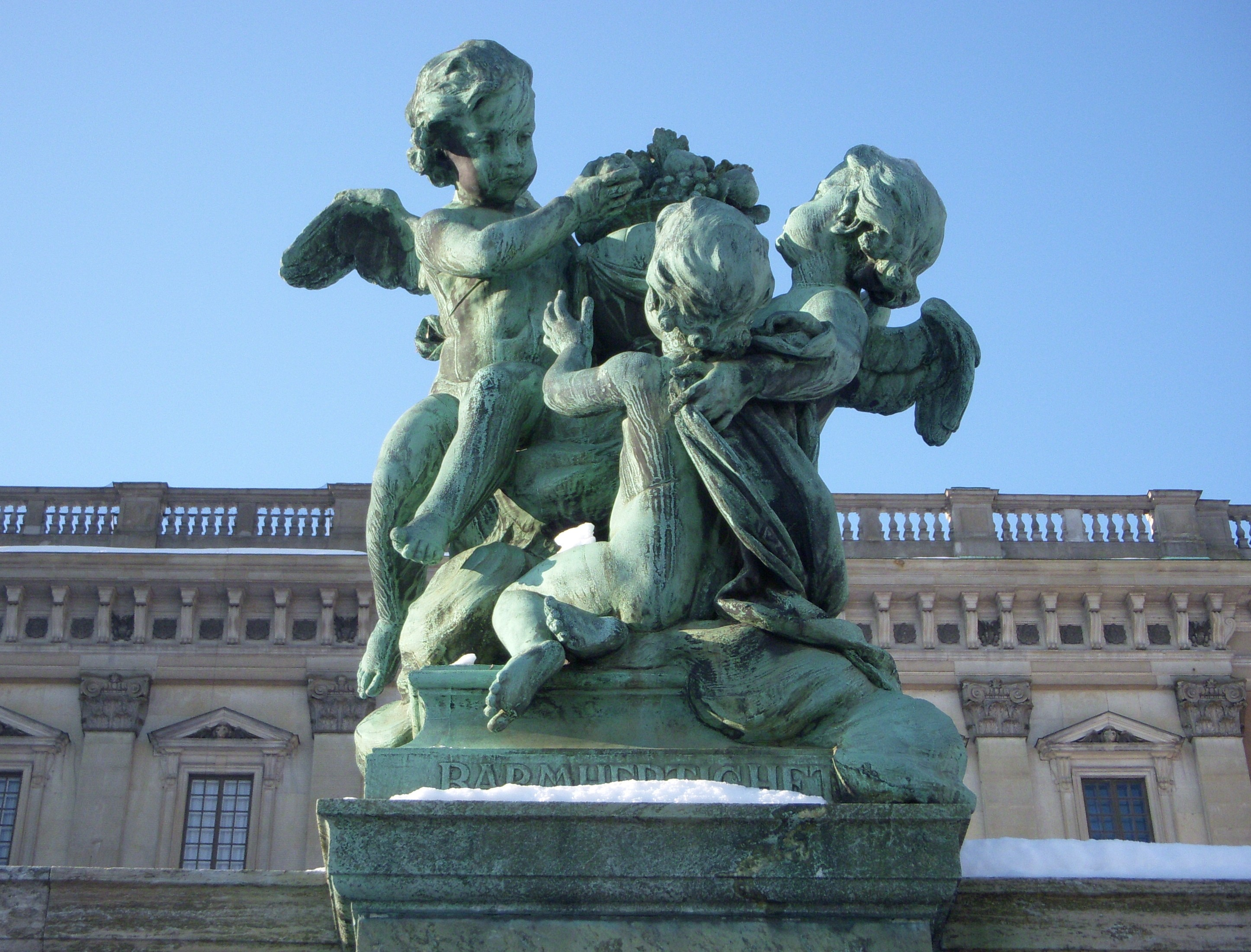 Stockholms slott skulptur "Barmhertigheten", östra längan